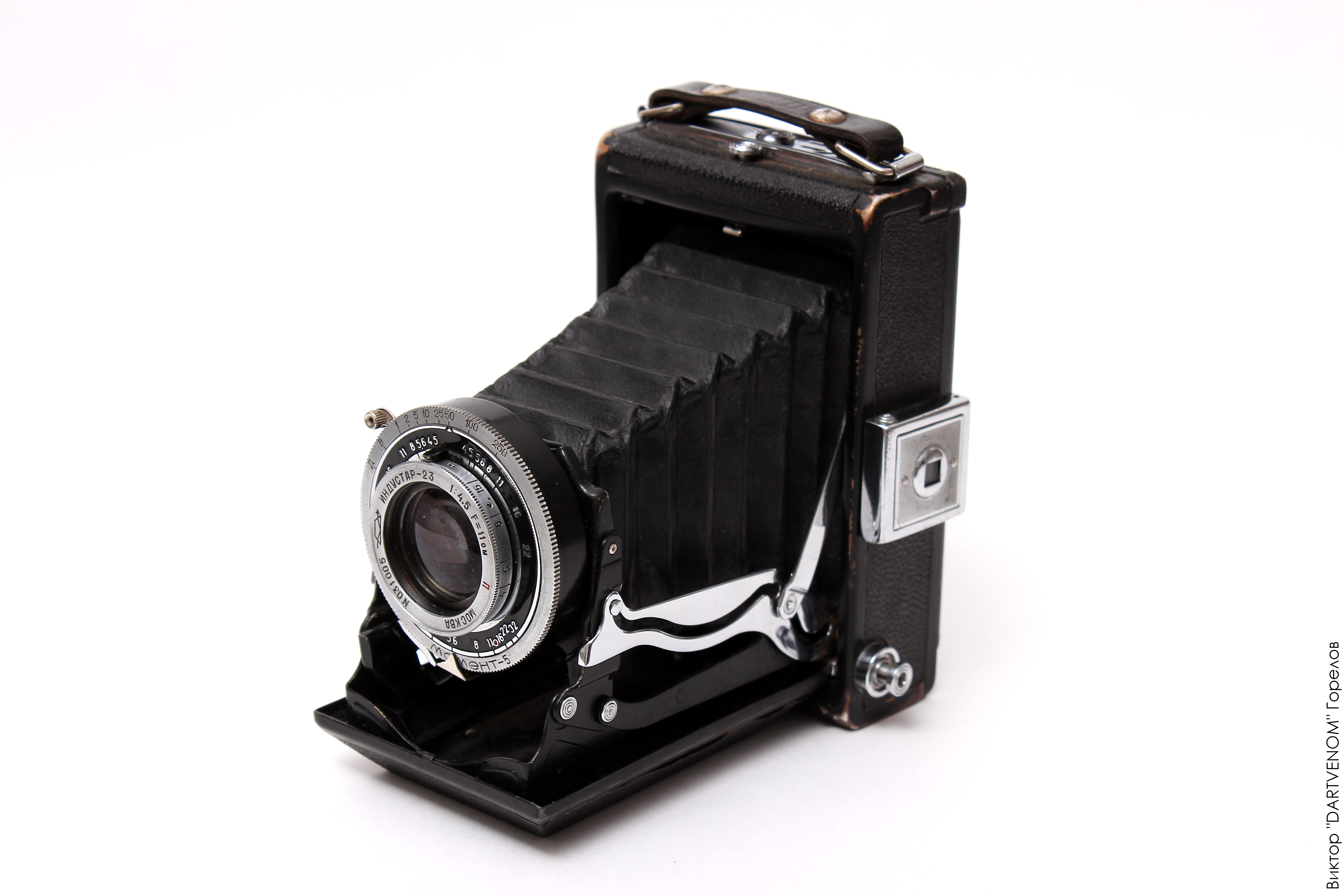 Фотоаппарат Москва-3